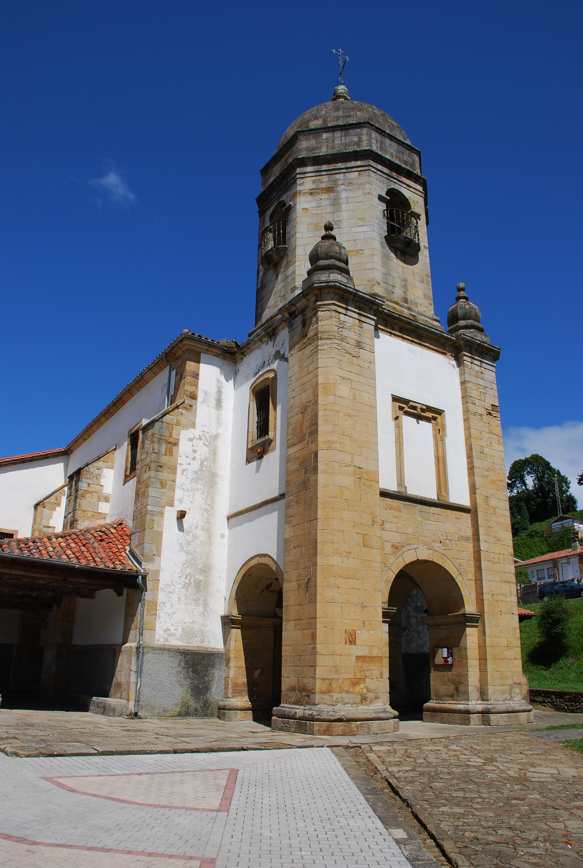 Iglesia de Santa María de Sabada en Lastres (Colunga, Asturias, España)